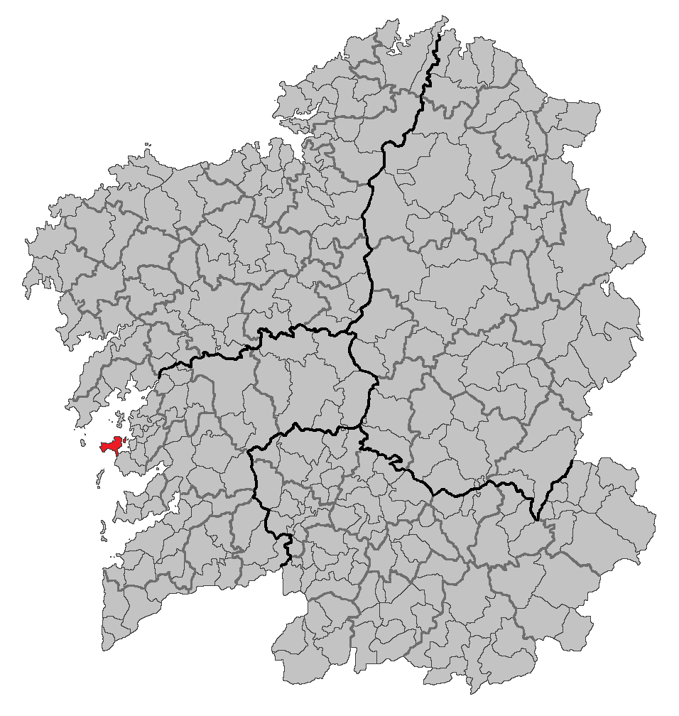 Mapa coa localización do concello de O Grove.